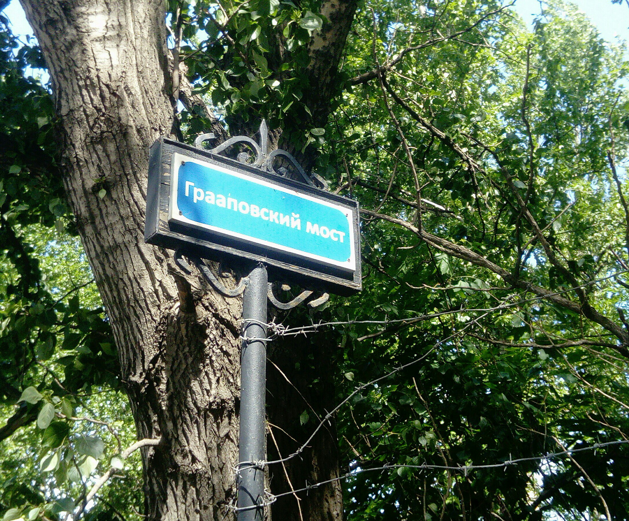 Табличка Грааповского моста через реку Волковку в Санкт-Петербурге